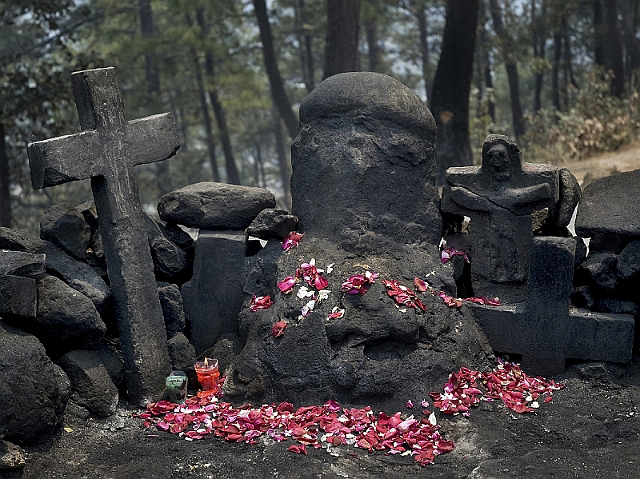 Ídolo de piedra Pascual Abaj venerado en la ciudad de Chichicastenango, Guatemala